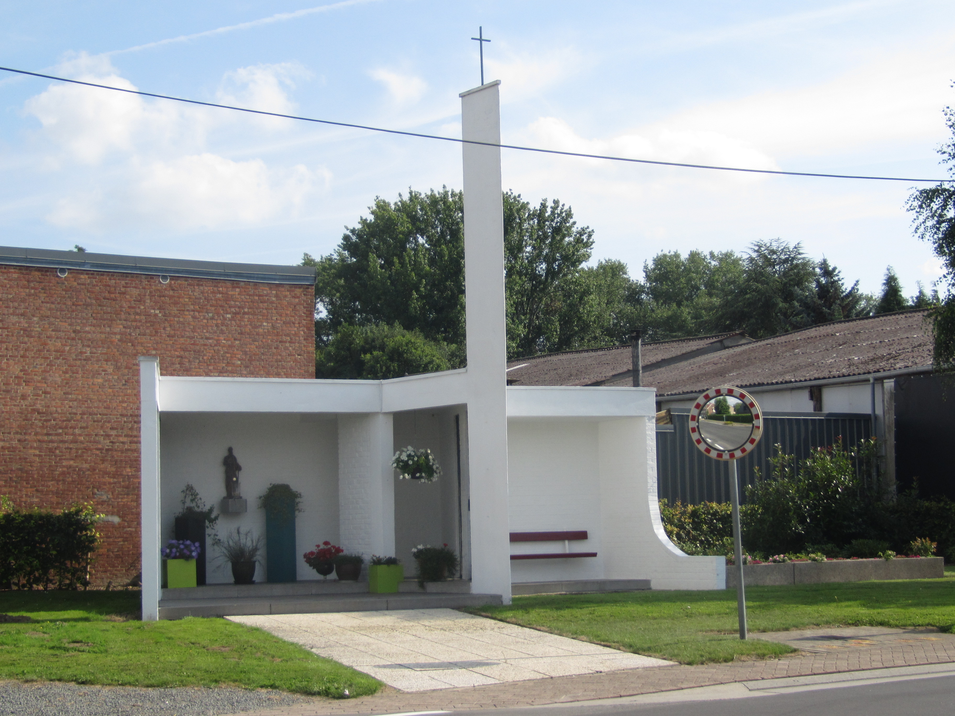 Sint-Pauluskapel, gebouwd in 1970, na afbraak van de vorige kapel als gevolg van wegenwerken. Gelegen aan het kruispunt Sint-Paulusbaan, Hulst en Nanovestraat.